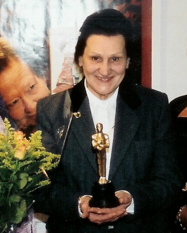 Agnes Debaillie, eigenares en uitbaatster van Cinema De Keizer